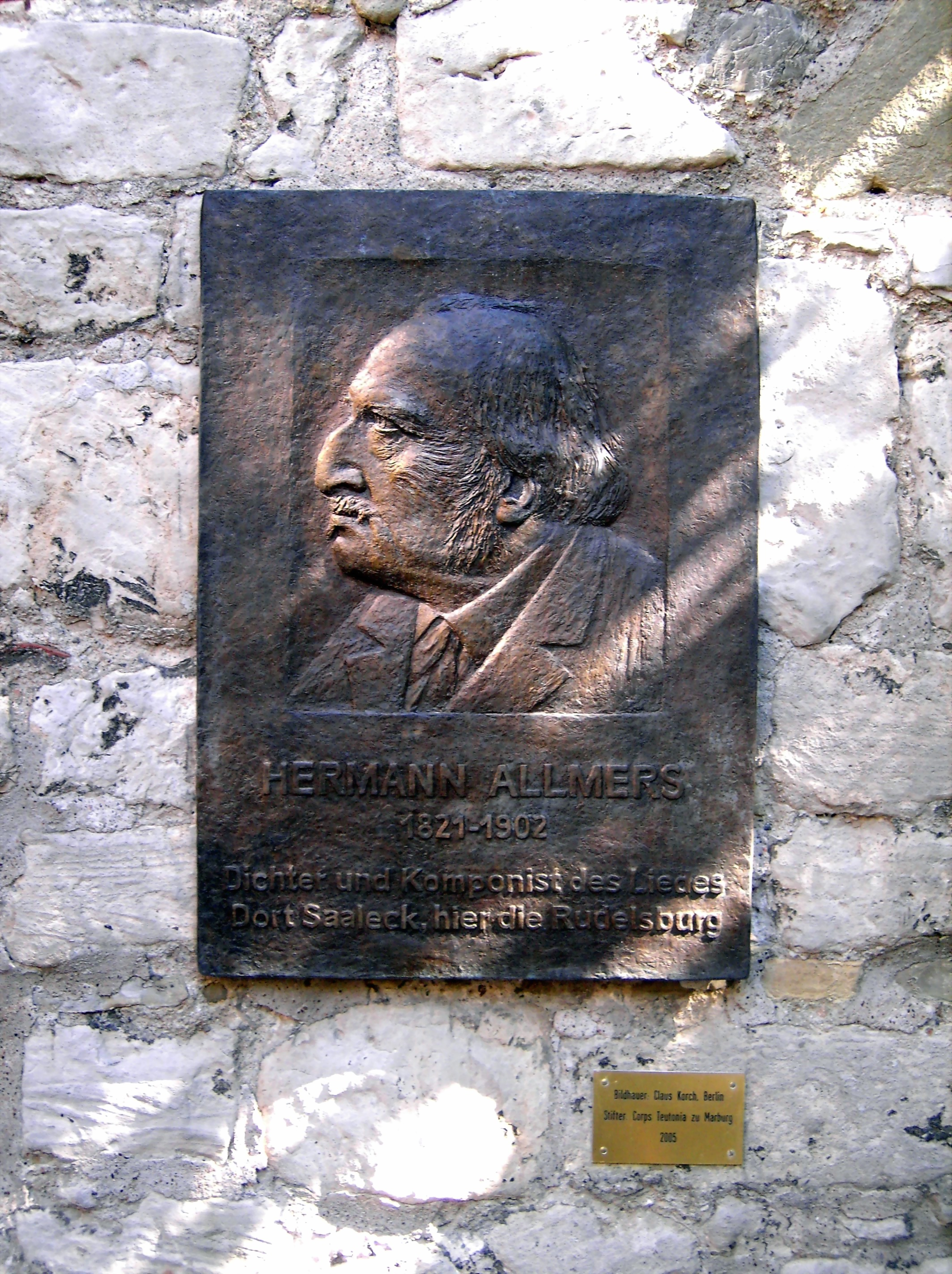 Rudelsburg, Gedenkplatte für Hermann Allmers, dem Dichter von "Dort Saaleck,hier die Rudelsburg"